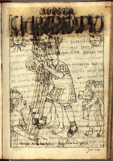 Yapuy Quilla